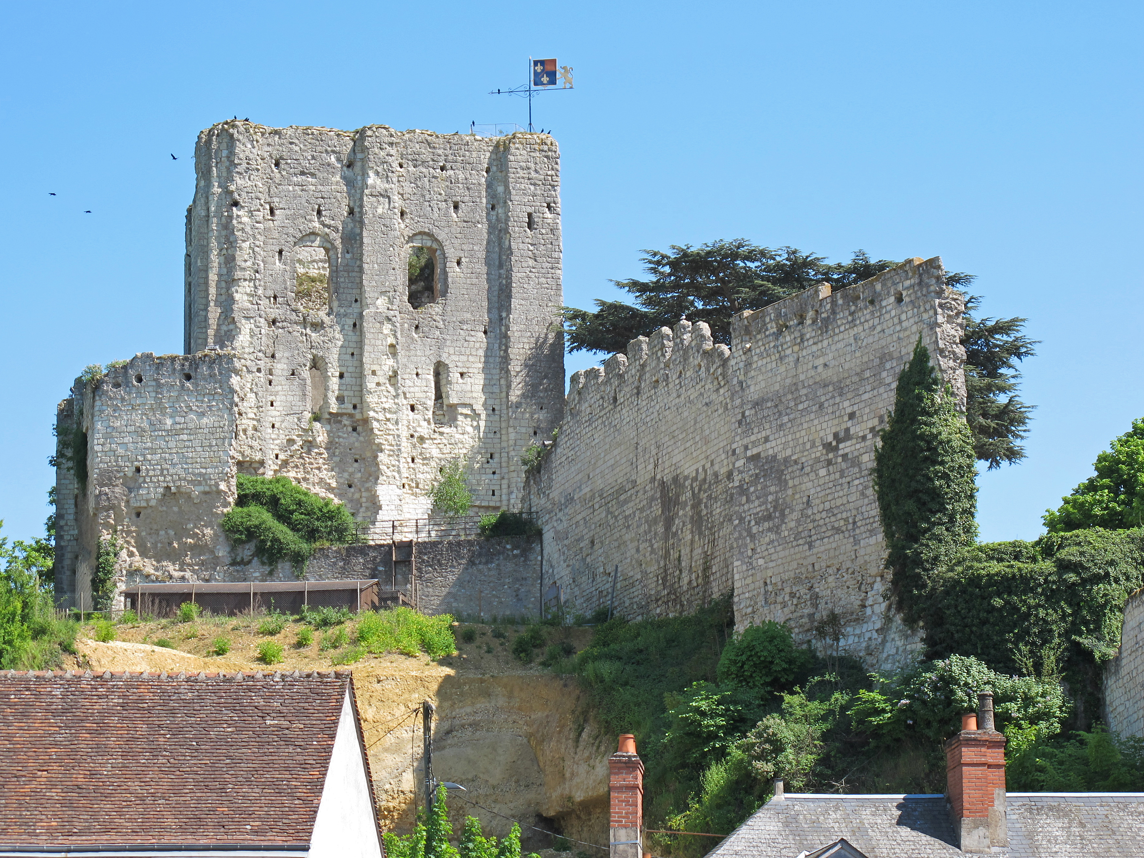 Le château de Montrichard, Loir-et-Cher (France)